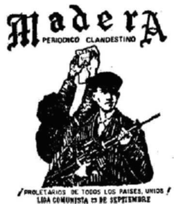 Portada del periódico «Madera» órgano de difusión del grupo guerrillero «Liga comunista 23 de septiembre»